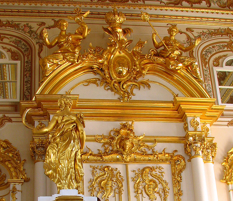 Интерьер Большого Петергофского дворца. Пардная лестница. Десюдепорт.